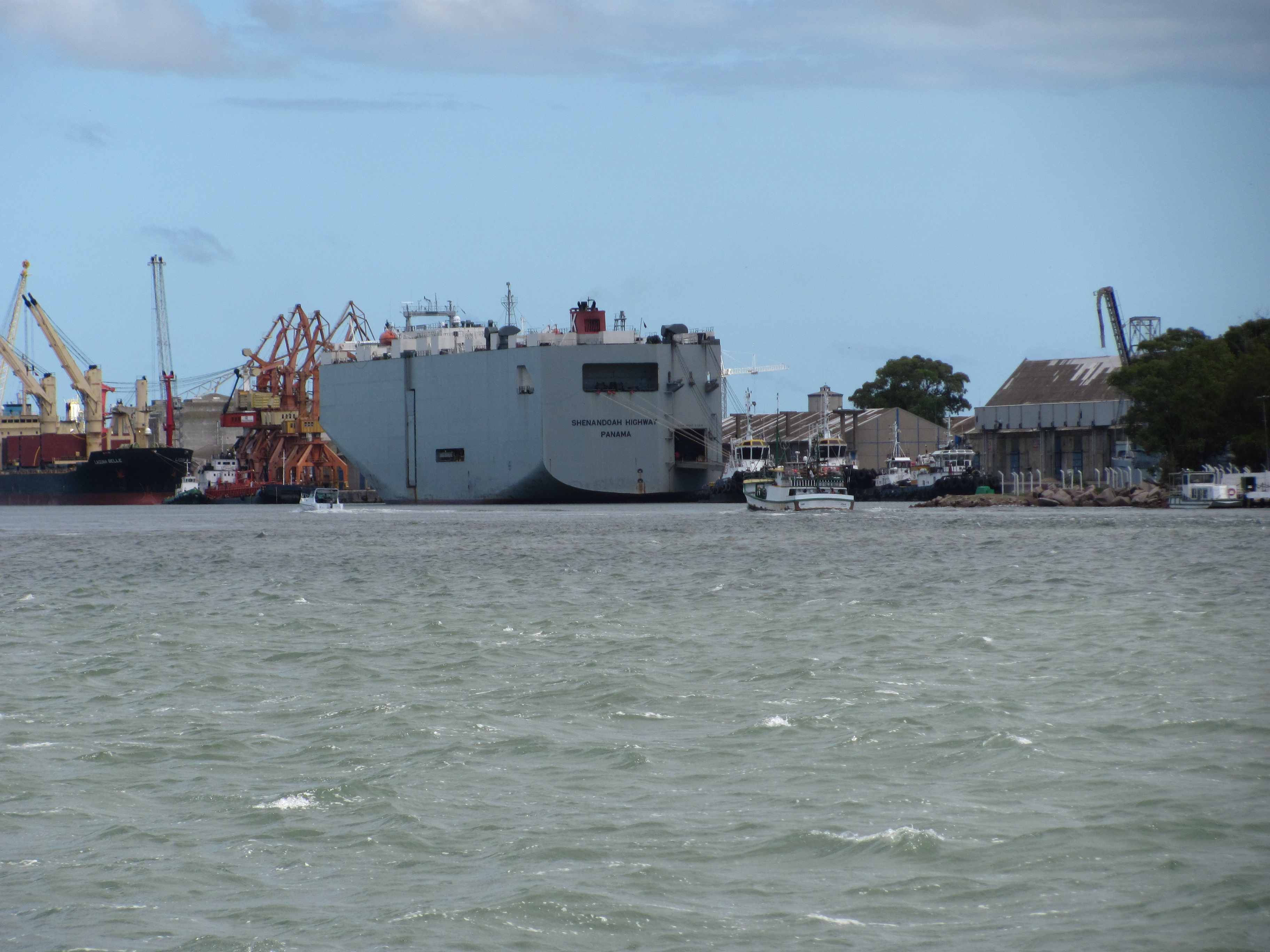 Navio Shenandoah Highway recebendo carga no porto de Rio Grande